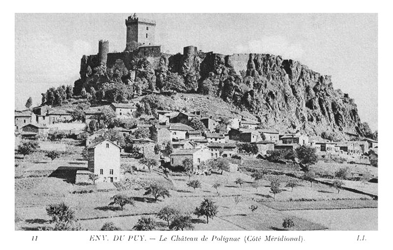 Sur la carte : Environs du Puy. - Le château de Polignac (Côté Méridional). / The card says: Near Le Puy. - The Castle at Polignac (Southern side).